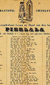 19e eeuws liedblad met volksliedje Pierlala